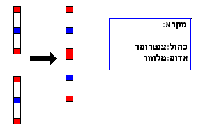 איור המראה סכמתית את תהליך האיחוי שהביא ליצירת כרומוזום 2 באדם